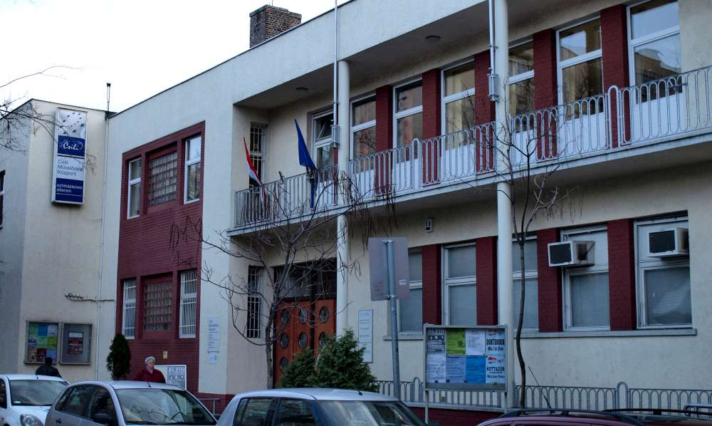 Csili Művelődési Központ, „A” épület. Budapest, XX.ker., Nagy Győry István u. 4-6.